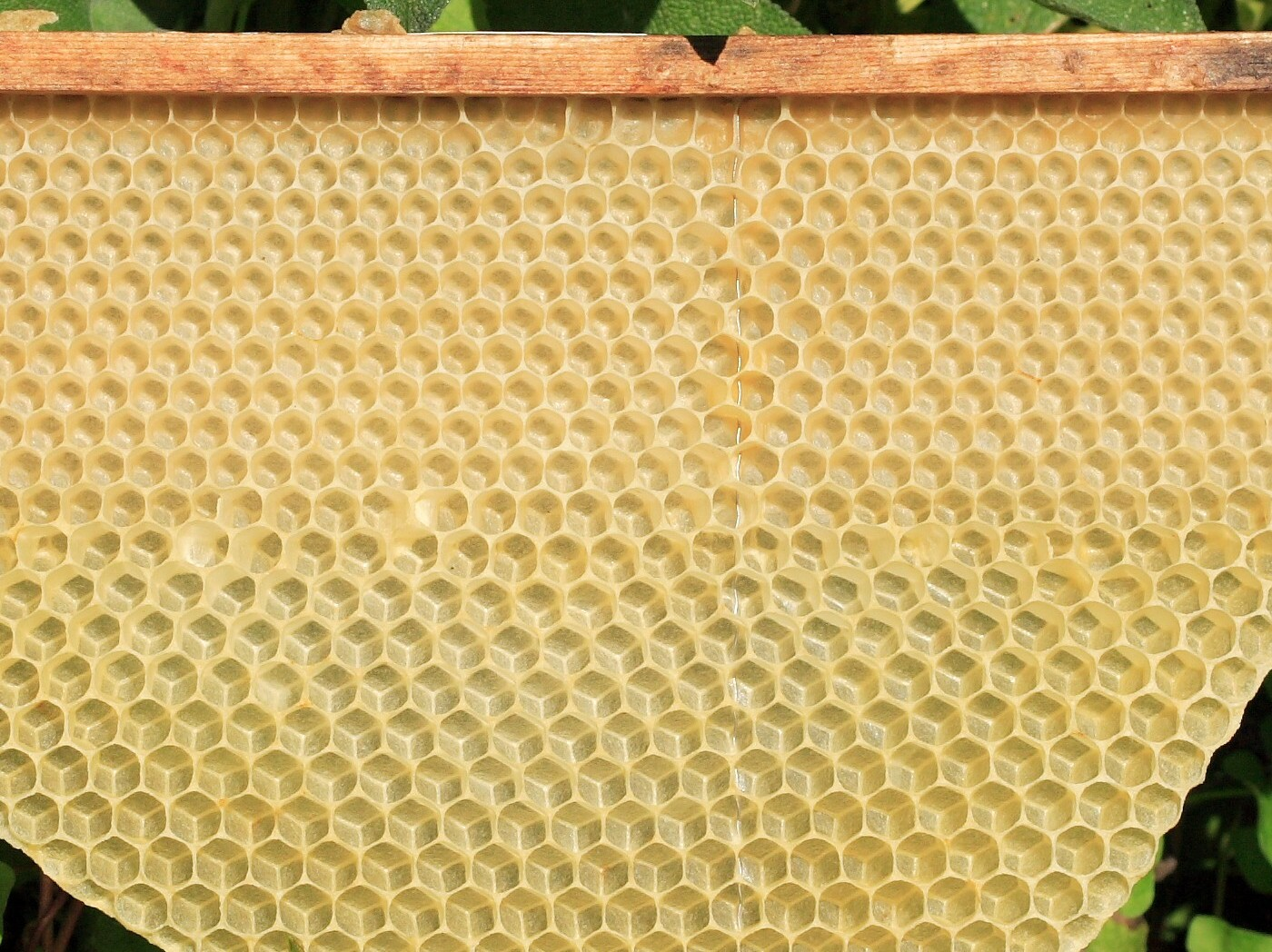 Begonnener Wabenbau der Honigbienen mit kleineren Zellen (Zelldurchmesser 5,3 mm) für Arbeiterinnenbrut (obere 11 Reihen) und mit größeren Zellen (Zelldurchmesser 6,9 mm) für Drohnenbrut unten. Im oberen Bereich war eine Mittelwand in der Wabe befestigt worden, auf der die Größe der Zellen vorgeprägt ist. Weiter unten, wo die Bienen diese Vorgabe nicht mehr hatten, haben sie Drohnenbau errichtet. So sieht eine Mittelwand aus, bevor sie die Bienen ausgebaut haben. Unterhalb sieht man Wachsplättchen, wie sie die Bienen ausschwitzen.